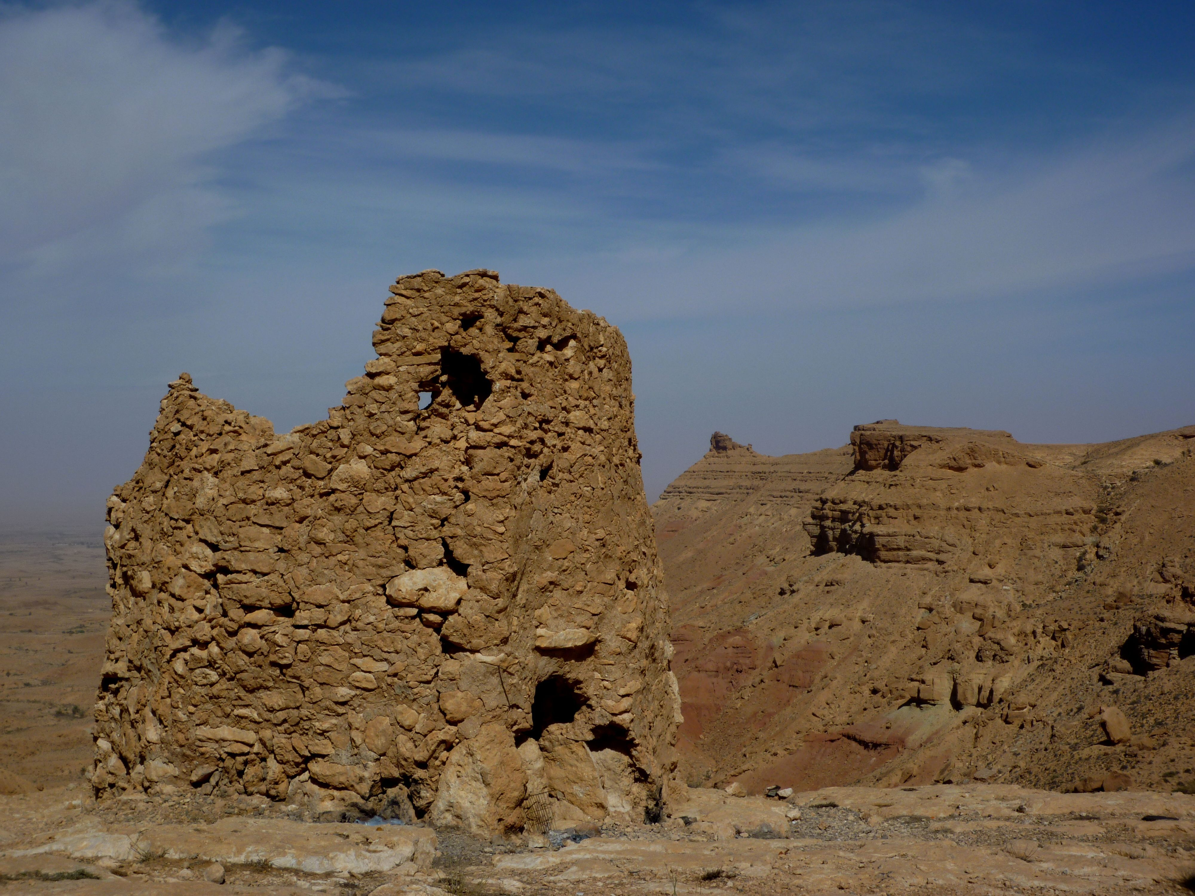 Nalut - Ruine eines alten Wachtturms